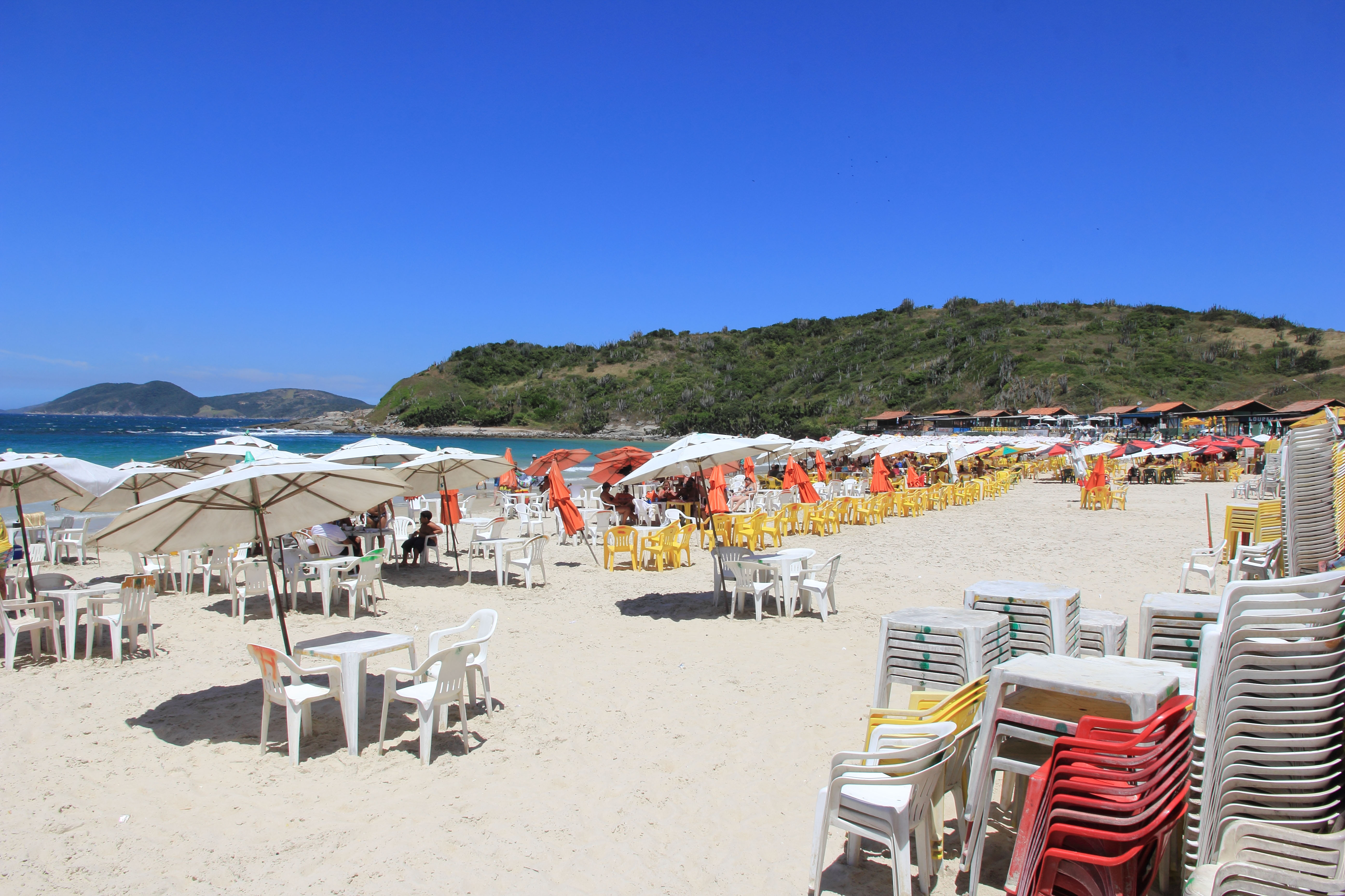 Praia das Conchas em Cabo Frio